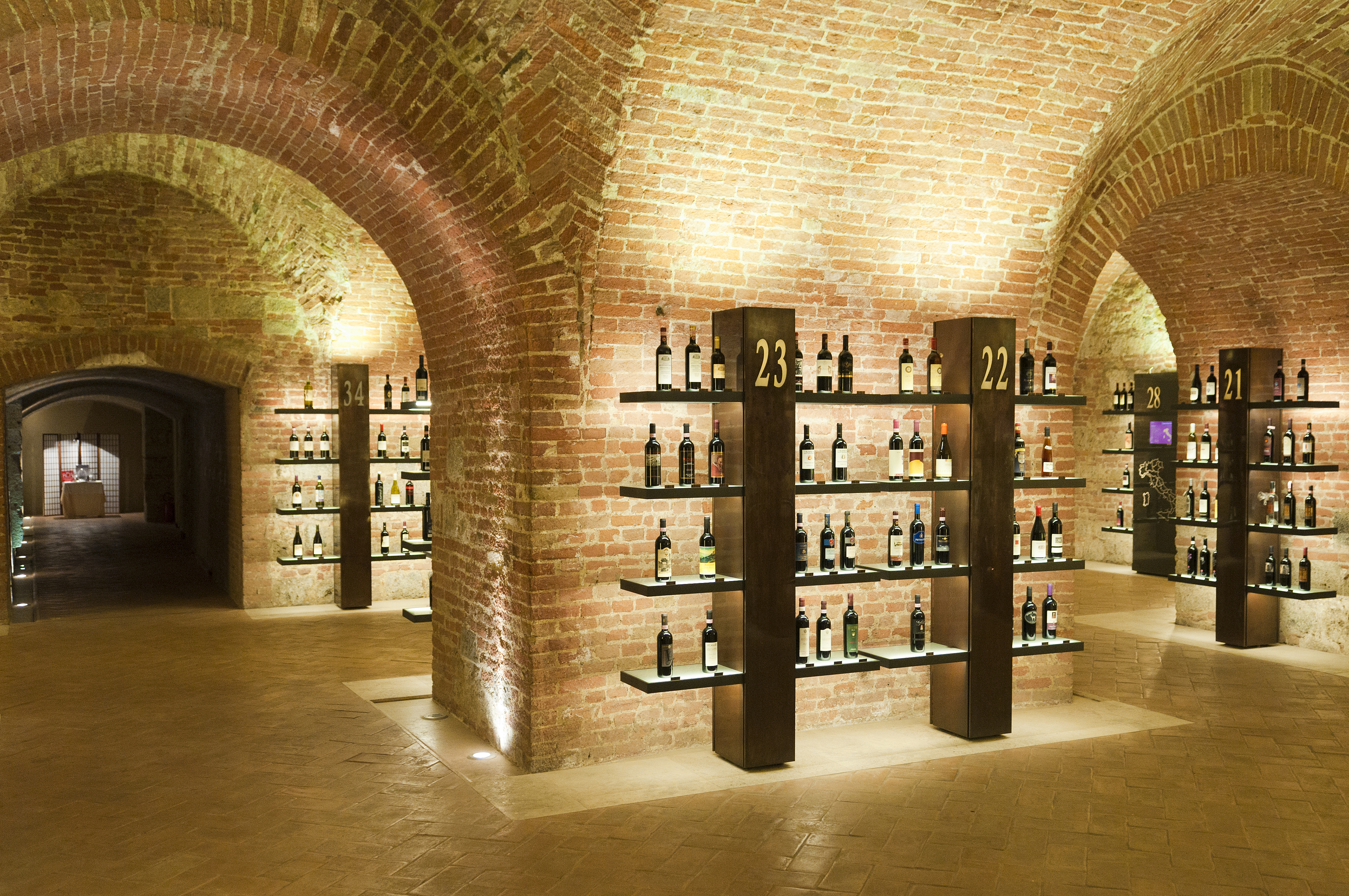 Ente Vini - Enoteca Italiana – Siena, Tuscany